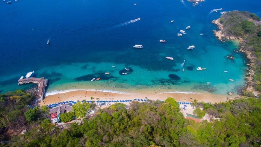 playa de la roqueta vista desde el faro